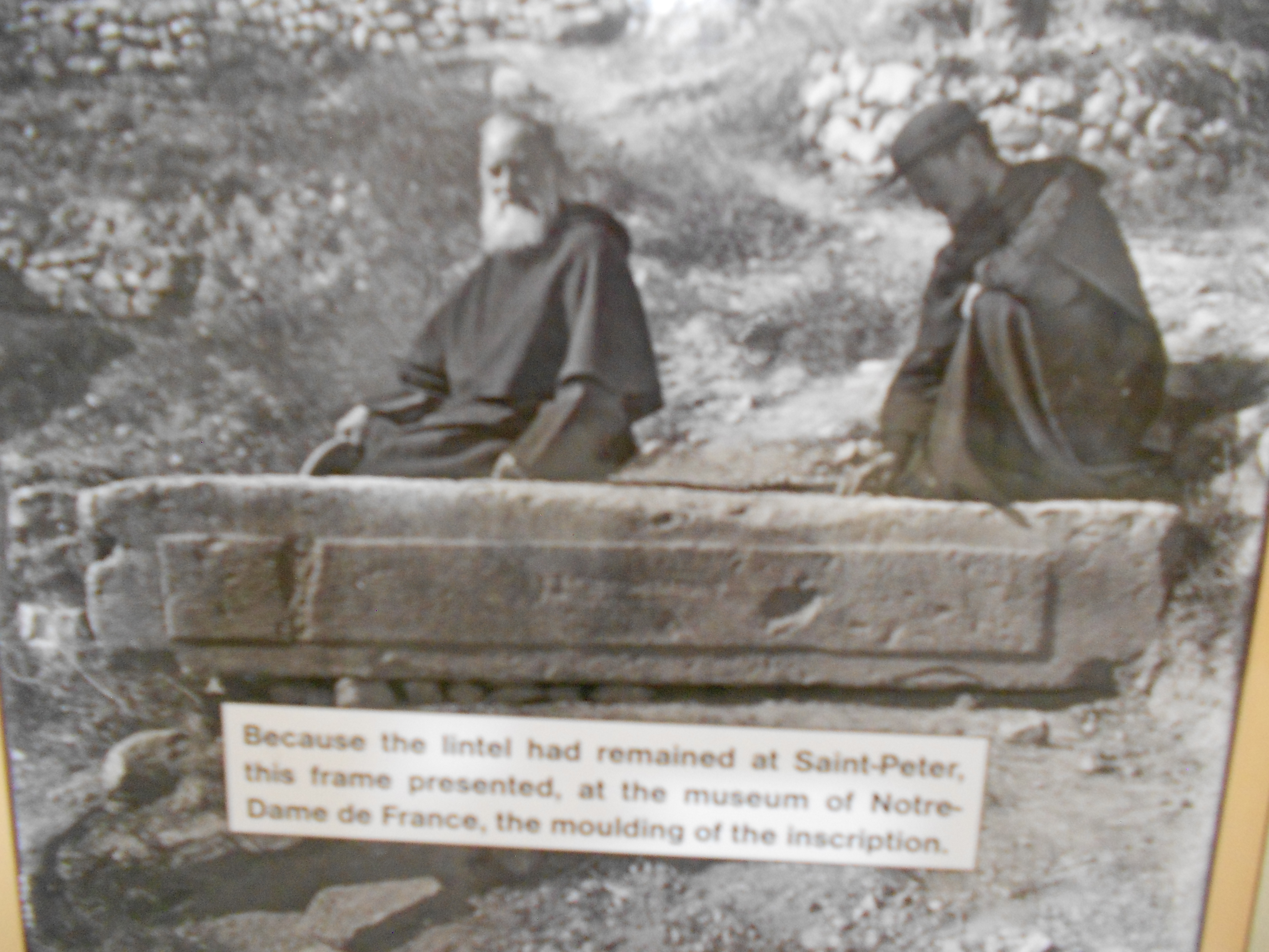 Inauguration du mémorial Joseph Germer-Durand 2018-06-28